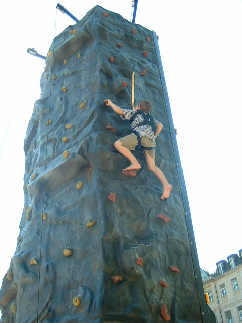 Kletterwand für Kinder, Frankfurt Main, Sommerfest Opernplatz